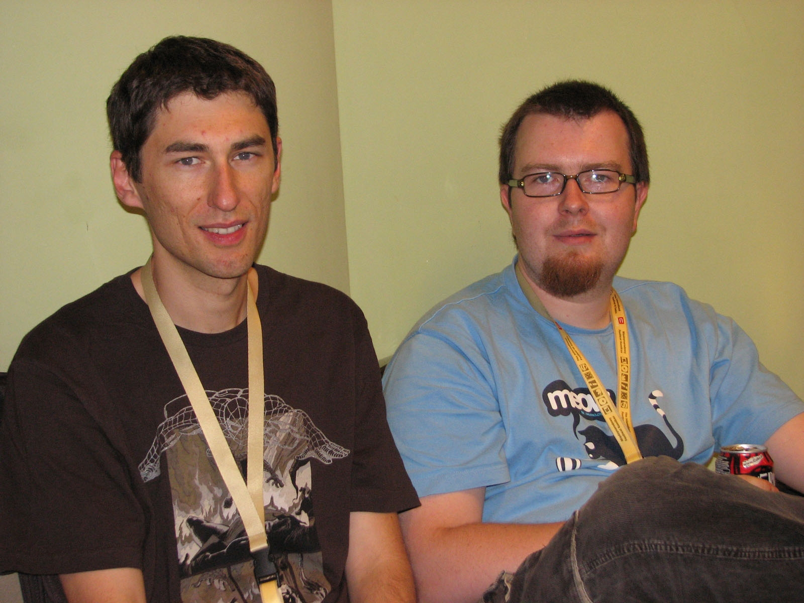 Scenarzysta Rafał Skarżycki (z lewej) i rysownik Tomasz Leśniak, twórcy postaci komiksowej Jeża Jerzego (XVII Międzynarodowy Festiwal Komiksu, Łódź, 7 października 2006). Fot.: Arek1979